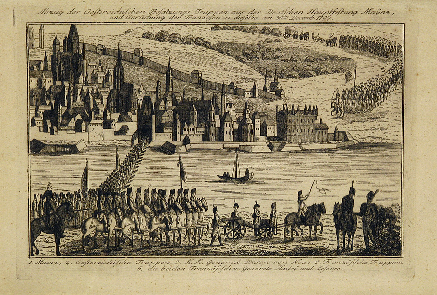 Abzug der österreichischen Besatzungstruppen aus der Deutschen Hauptfestung Maynz, und Einrückung der Franzosen in dieselbe am 30ten Decemb. 1797